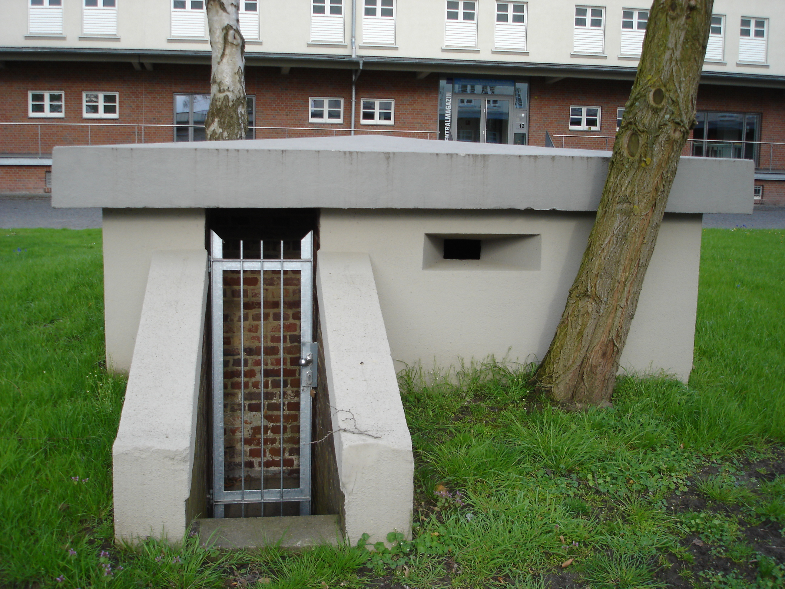 Old bunker in the "Speicherstadt" (granery) in Münster, Westphalia, Germany